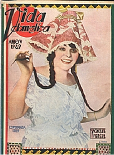 Capa da revista brasileira Vida Doméstica, de 1924, trazendo na capa a atriz mexicana Esperanza Iris.